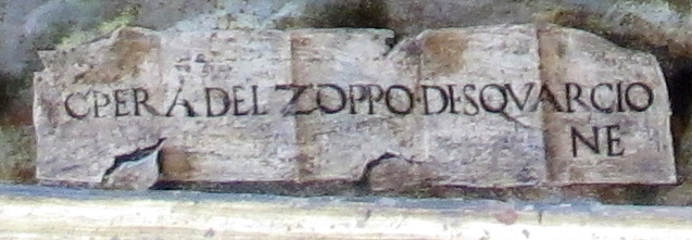 Pittura del Quattrocento italiano, Louvre